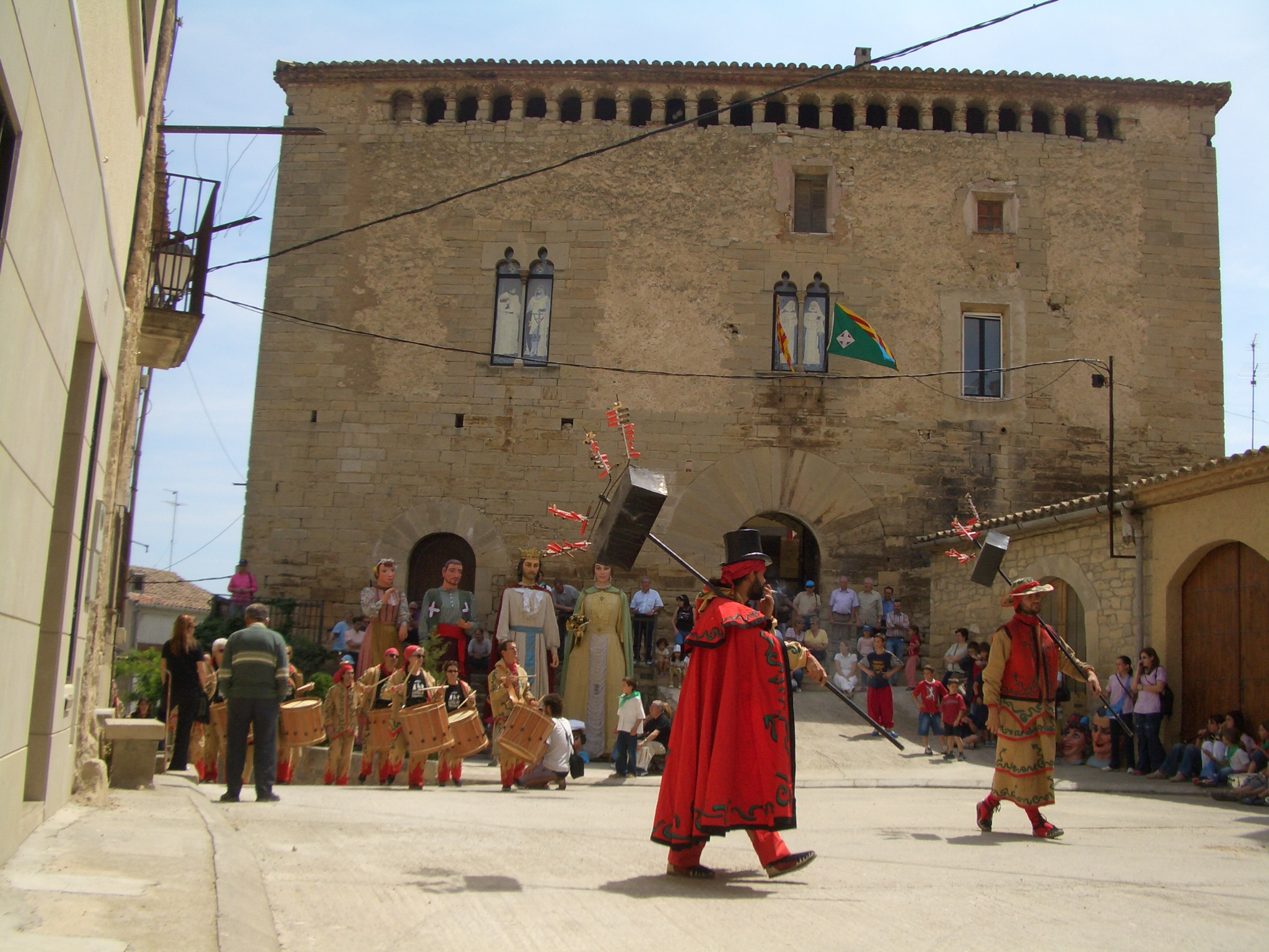 Els diables davant la façana del Castell de l'Espluga